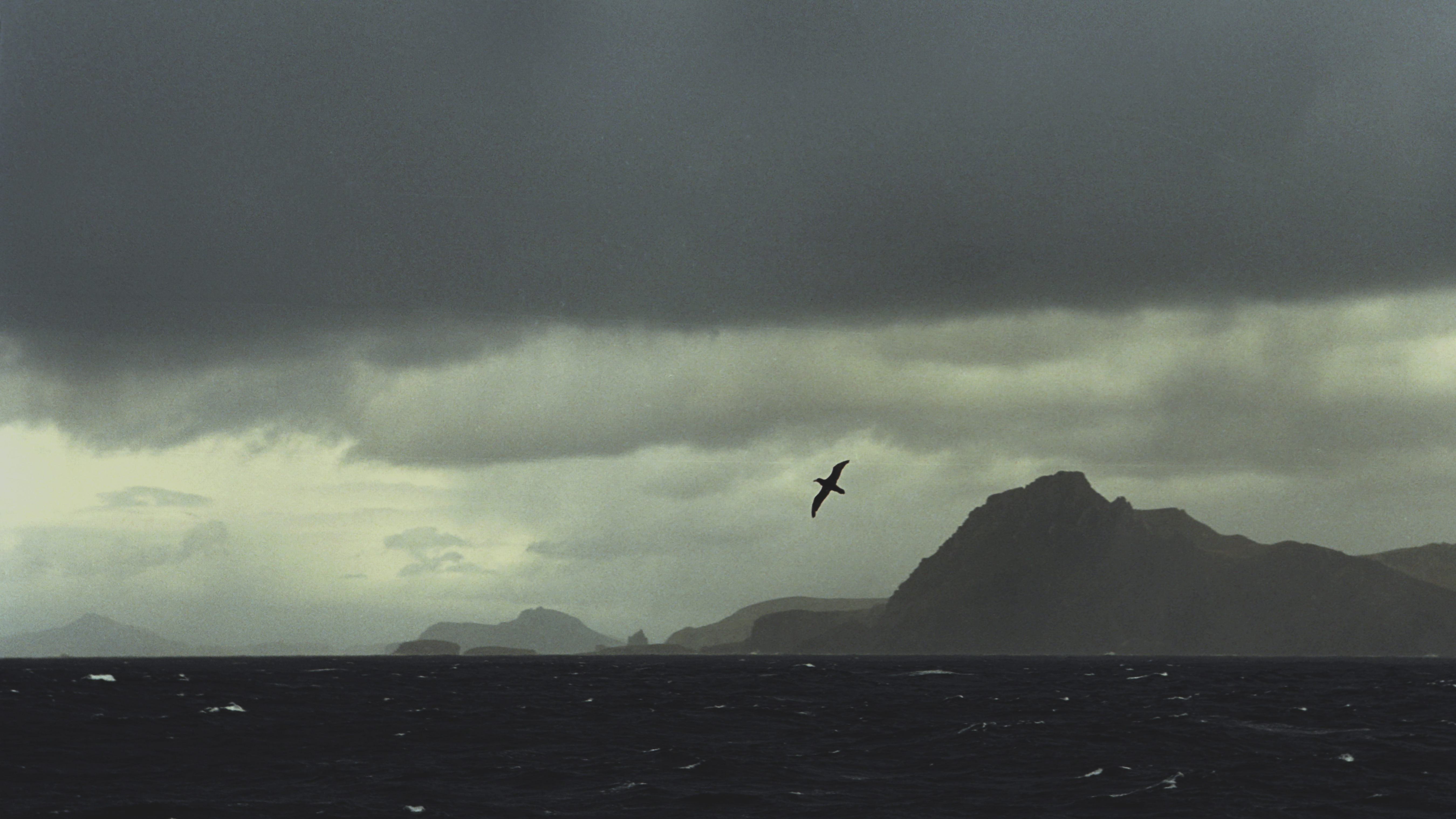 Antarctica, Cape Horn